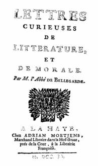 Title page of "Lettres curieuses de littérature et de morale" by French writer Jean-Baptiste Morvan de Bellegarde